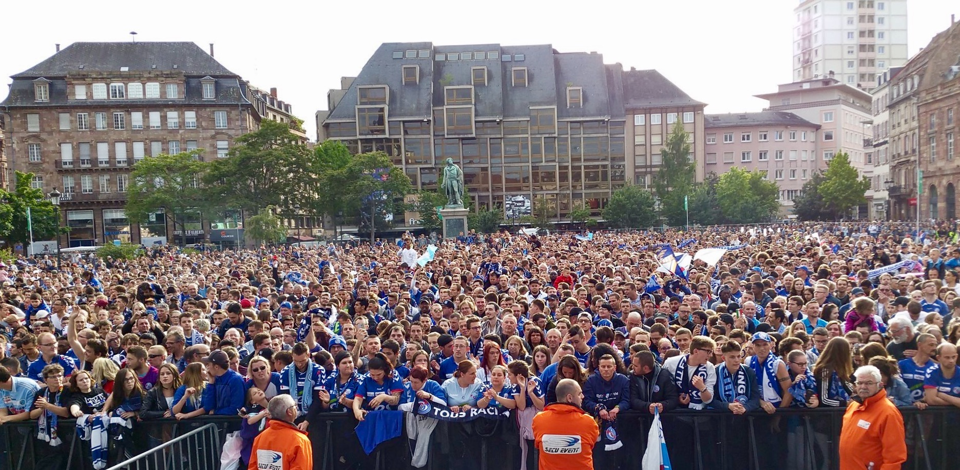 Montée du RCS fêtée place Kléber à Strasbourg